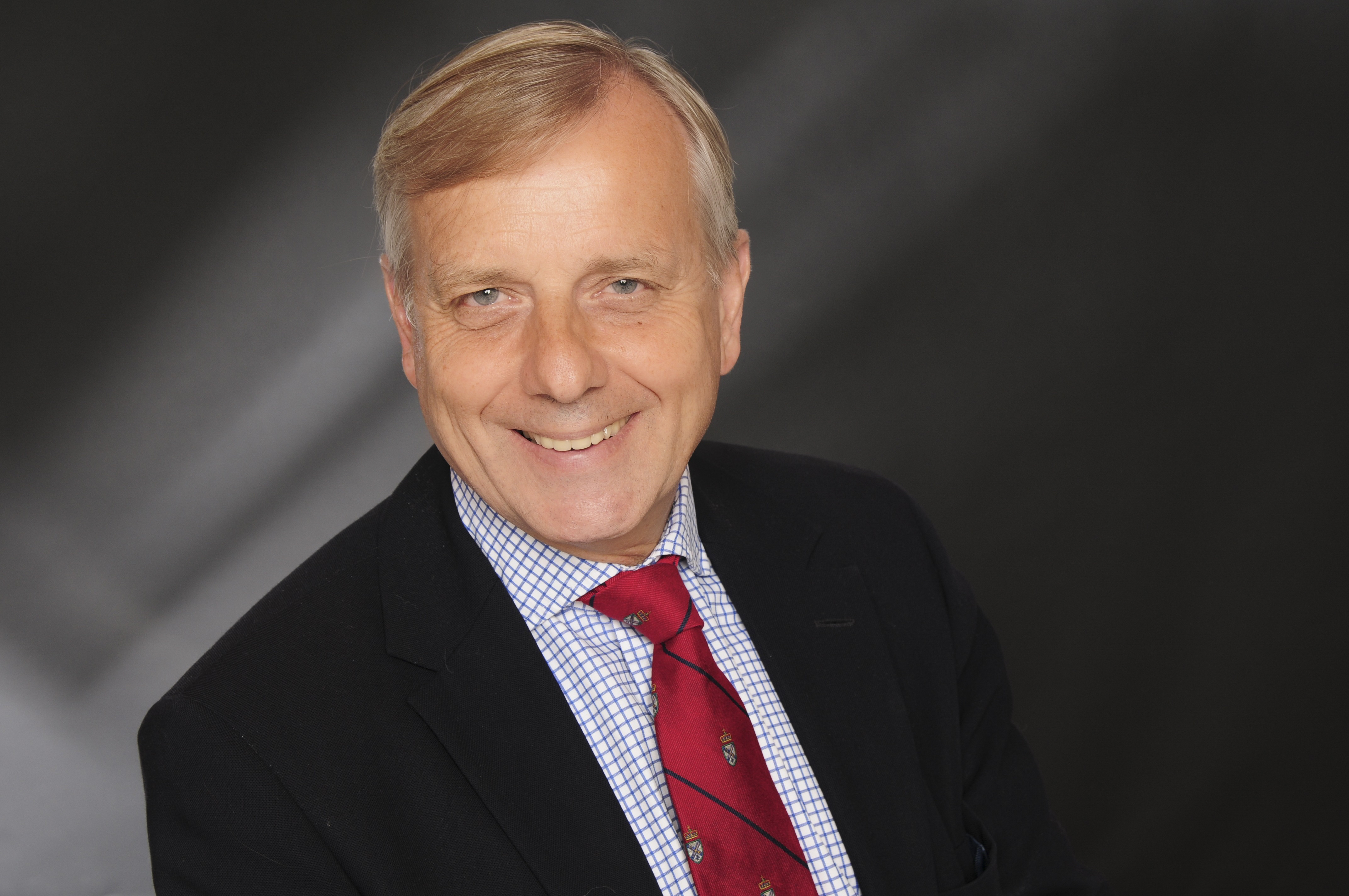 Ein Bild von Dr. Ernst-Michael von Abercron. Mitglied des 19. Deutschen Bundestages